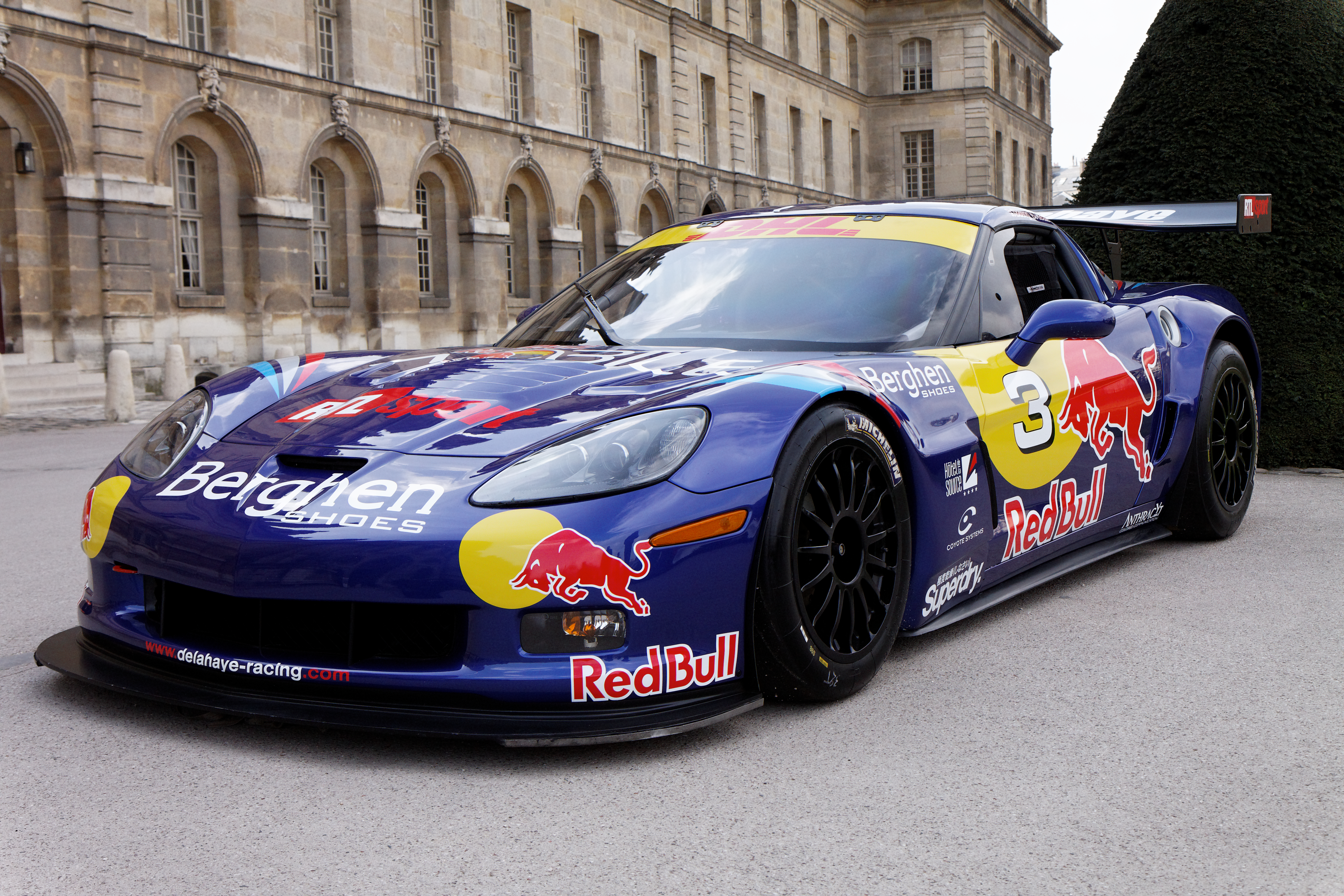 Photographie prise lors de la présentation du Blancpain Endurance series aux Invalides à Paris en mars 2011.